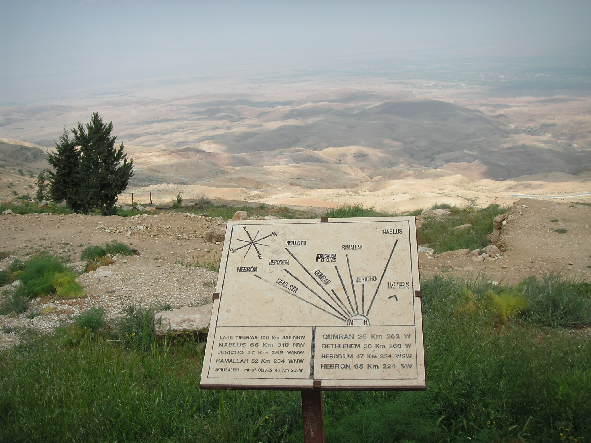 Blick vom Berg Nebo